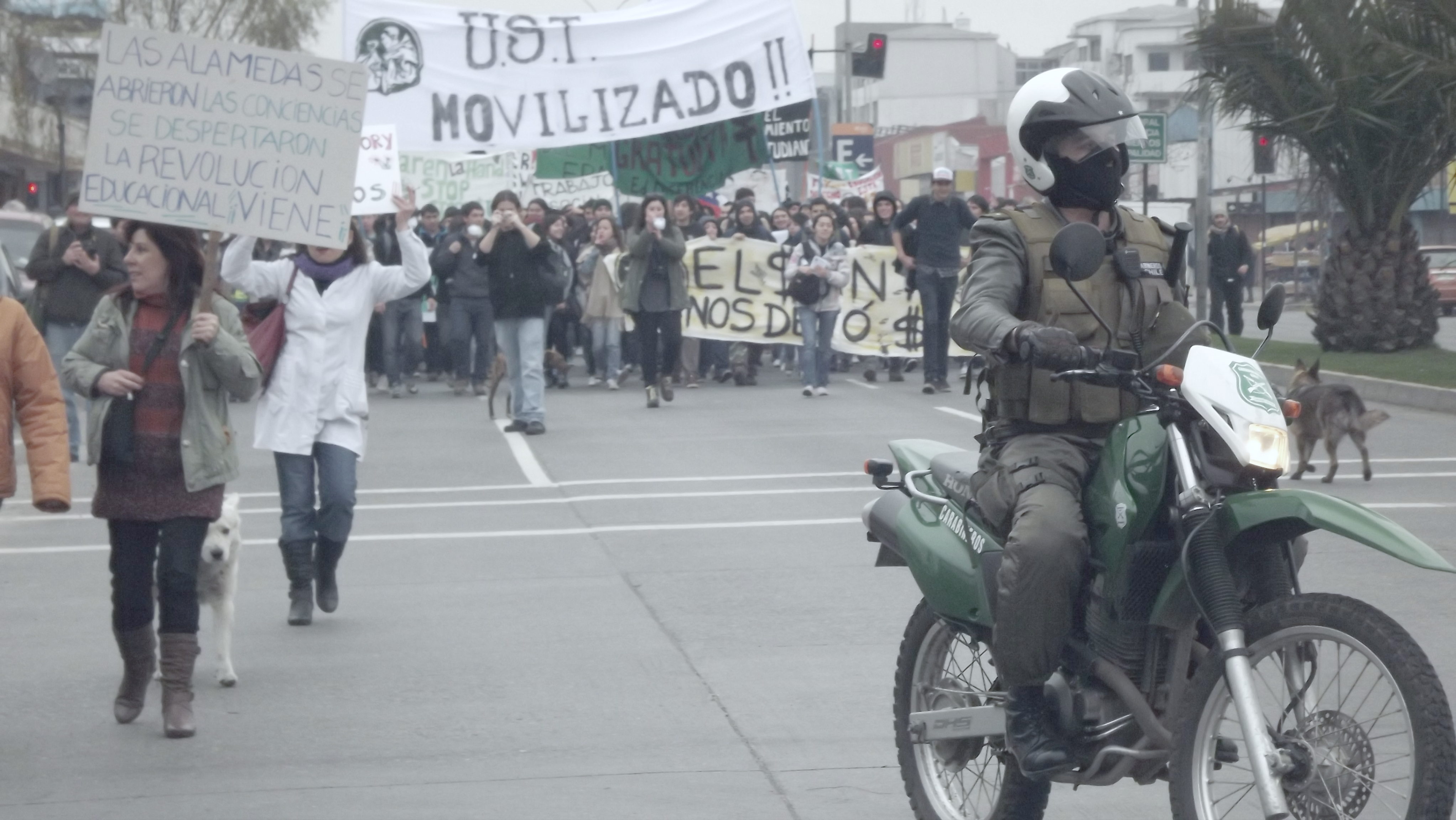 Carabineros motorizados y estudiantes protestado en el paro de la Cut y Estudiantes movilizados 2011